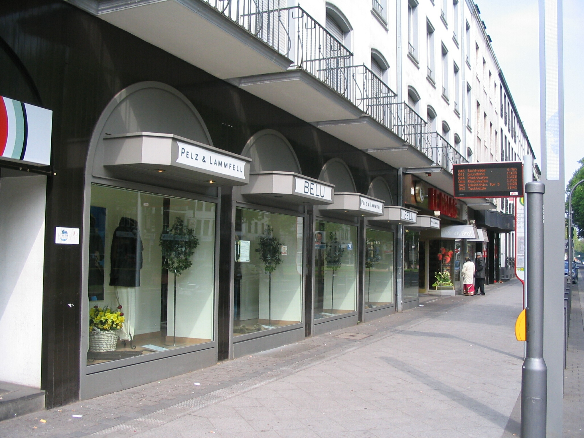 Belu GmbH, Pelz und Lammfell, Kürschnermeister Klaus Berner, Klaus Bungter und Heinz Günter Lubert, 47798 Krefeld, Ostwall 100 (übernommen 2006) vormals an gleicher Stelle Pelzmoden Bisegger (seit 1974)